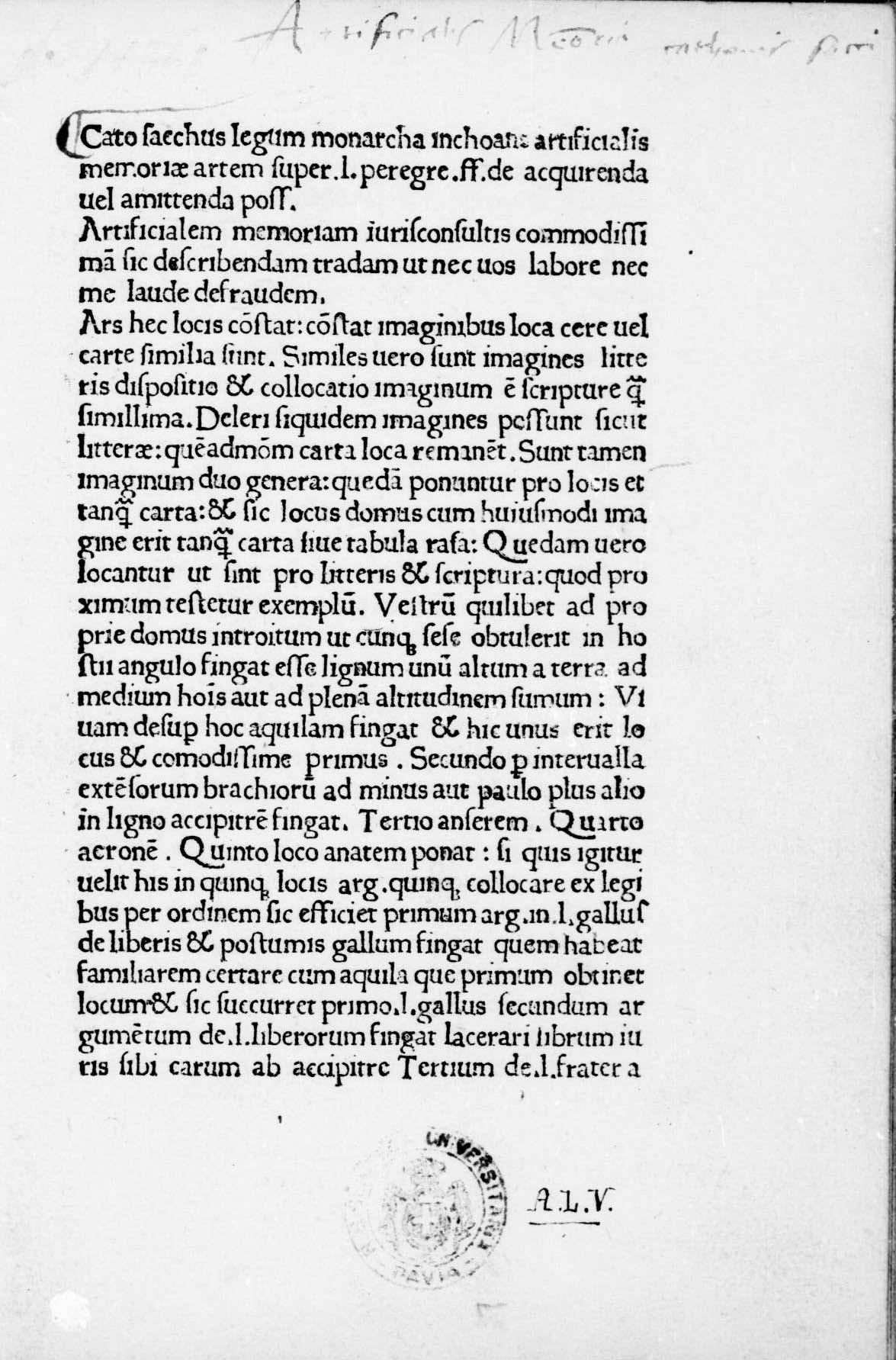 carta pi greco 1r